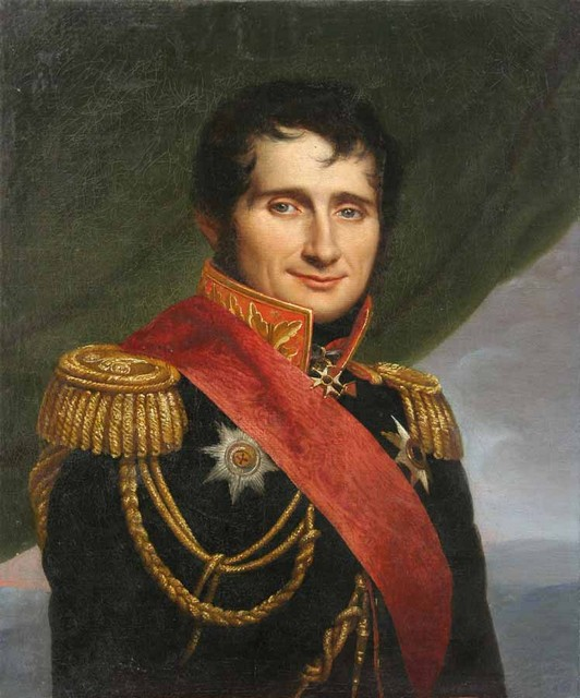 Портрет барона Генриха Вельяминовича Жомини